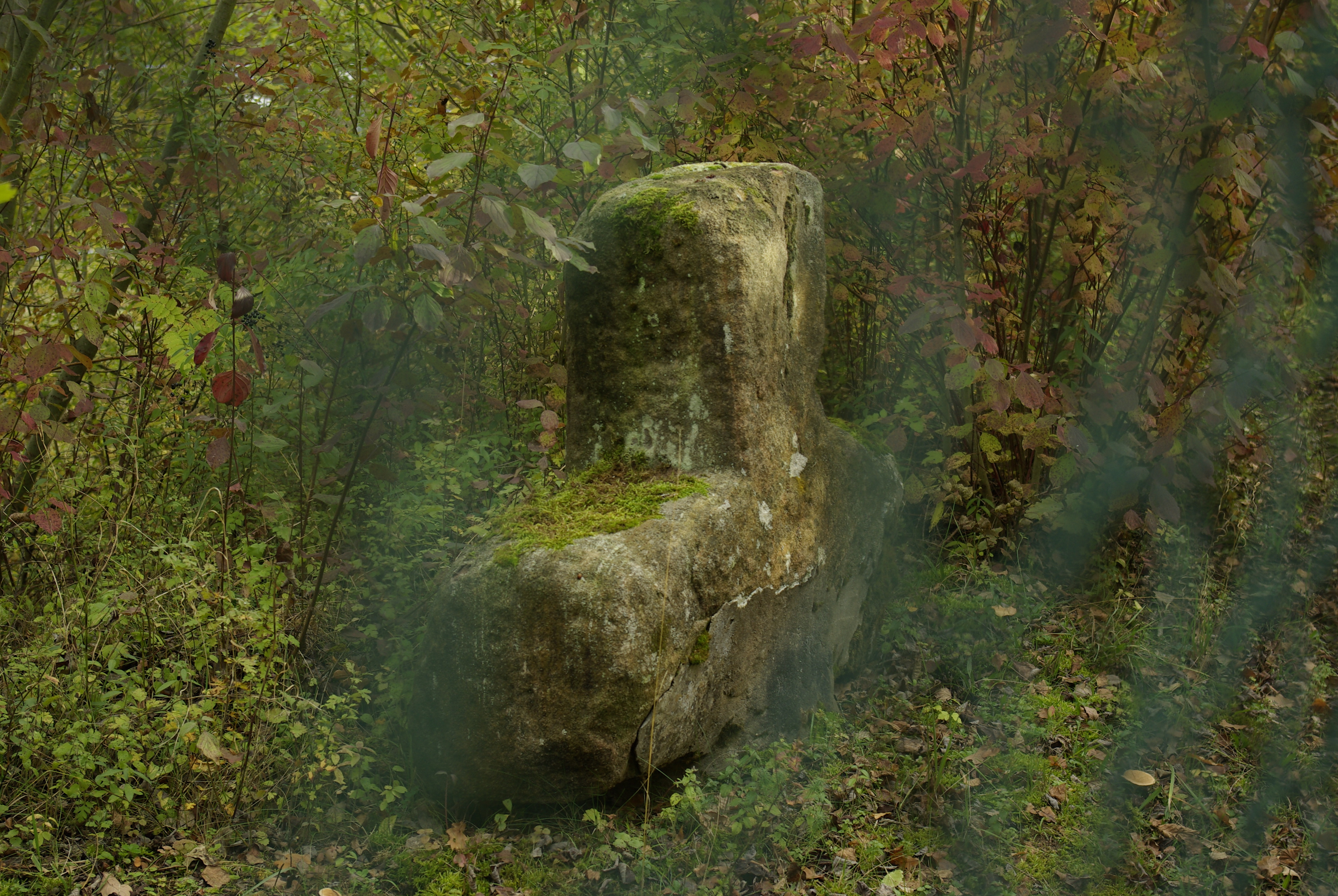 Steinkreuz bei Kriegenbrunn in der Waldabteilung beim Kreuzstein, heute Umspannwerk Kriegenbrunn, nördlich der Schleuse Kriegenbrunn